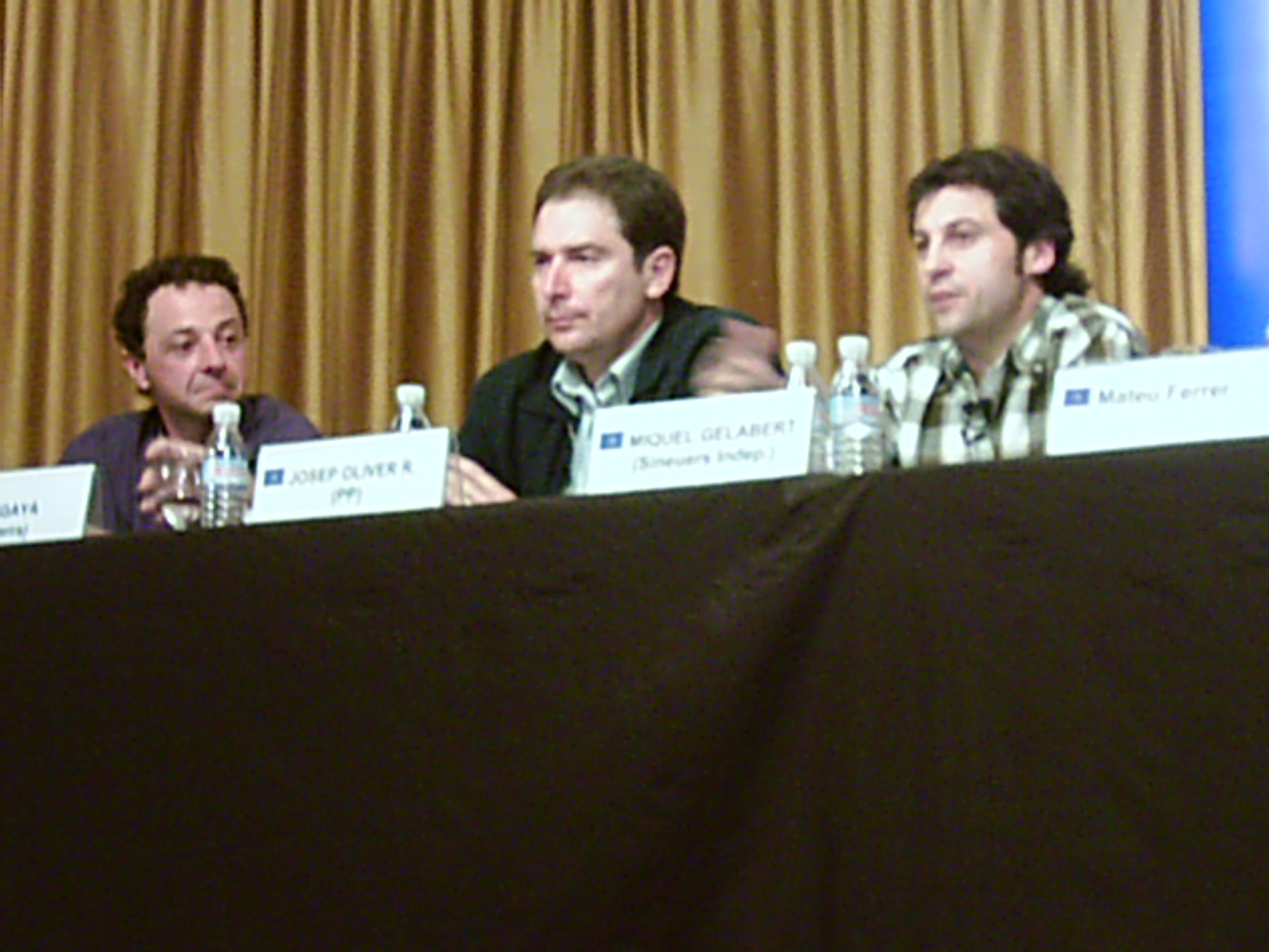 Julià Gayà (ERC), Josep Oliver (PP), i Miquel Gelabert (SI), en taula rodona durant la campanya pels comicis locals de Sineu del 2007